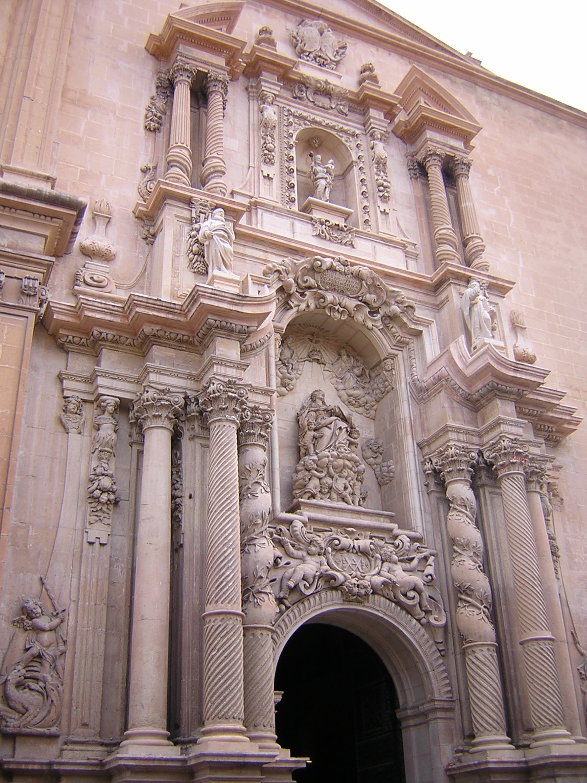 Façana de la Basílica de Santa Maria d'Elx (Baix Vinalopó, Alacant)